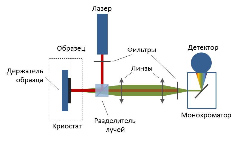 Схема установки фотолюминесцентной спектроскопии